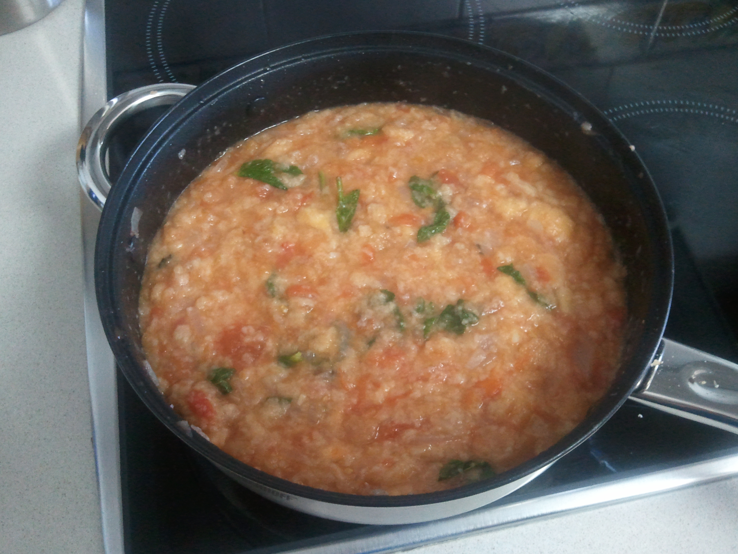 Sopa de tomate con pan más hierbabuena, provincia de Cádiz, España.